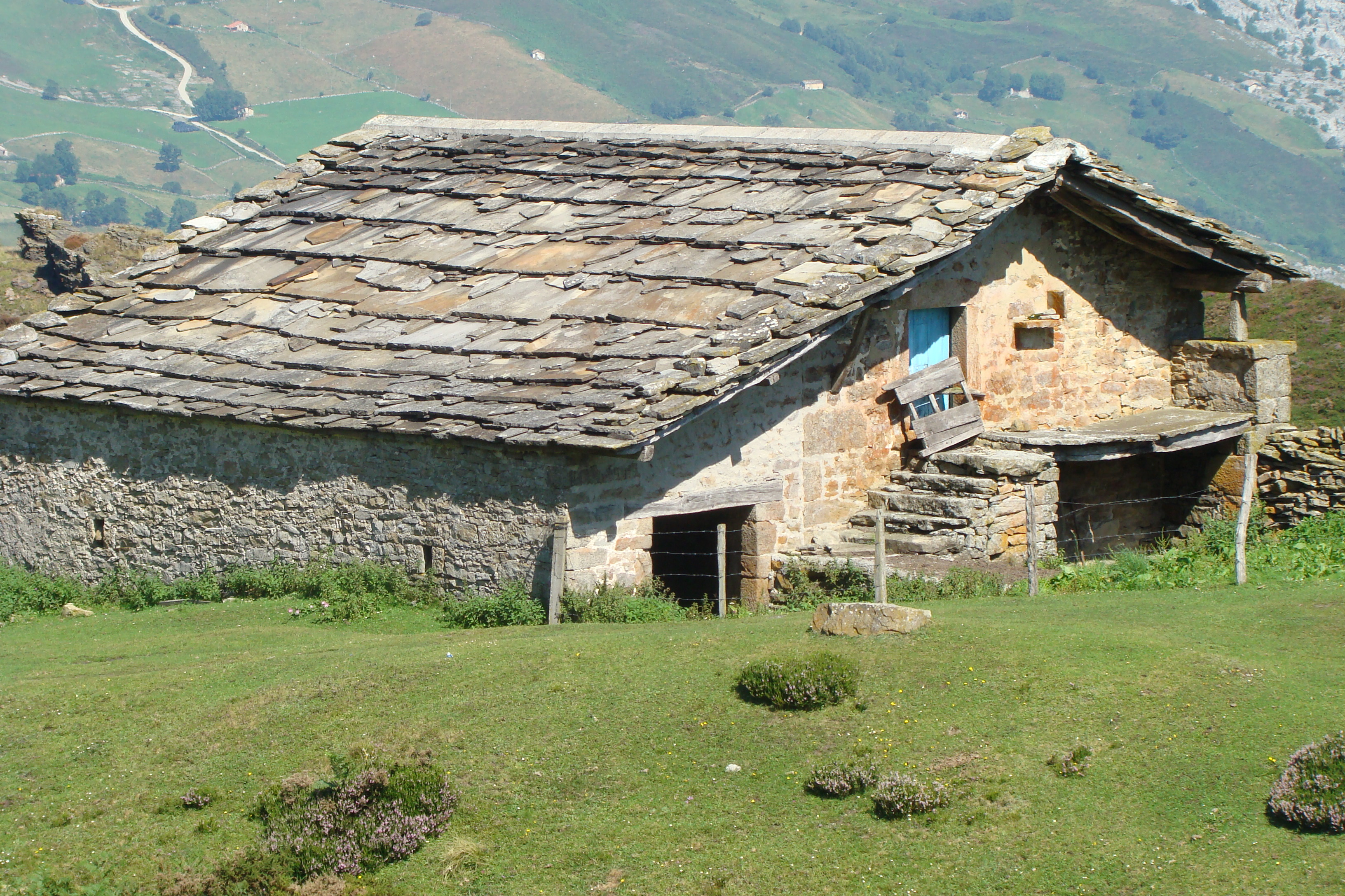 Ejemplo de cabaña pasiega con patín arcaico